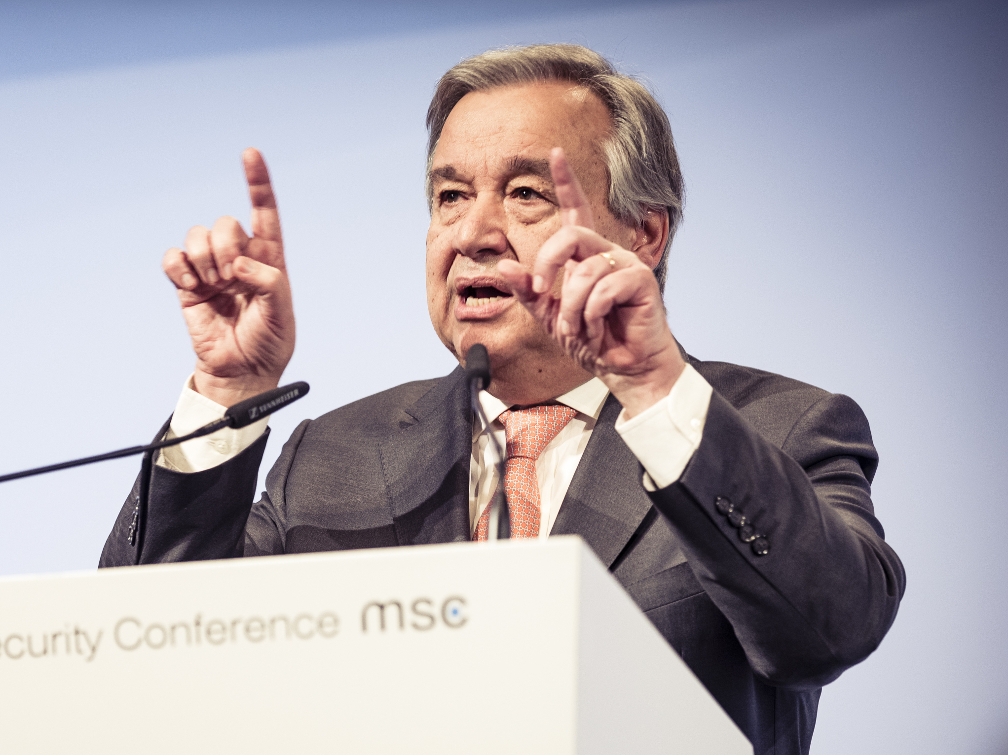 António Guterres während der Münchener Sicherheitskonferenz 2018